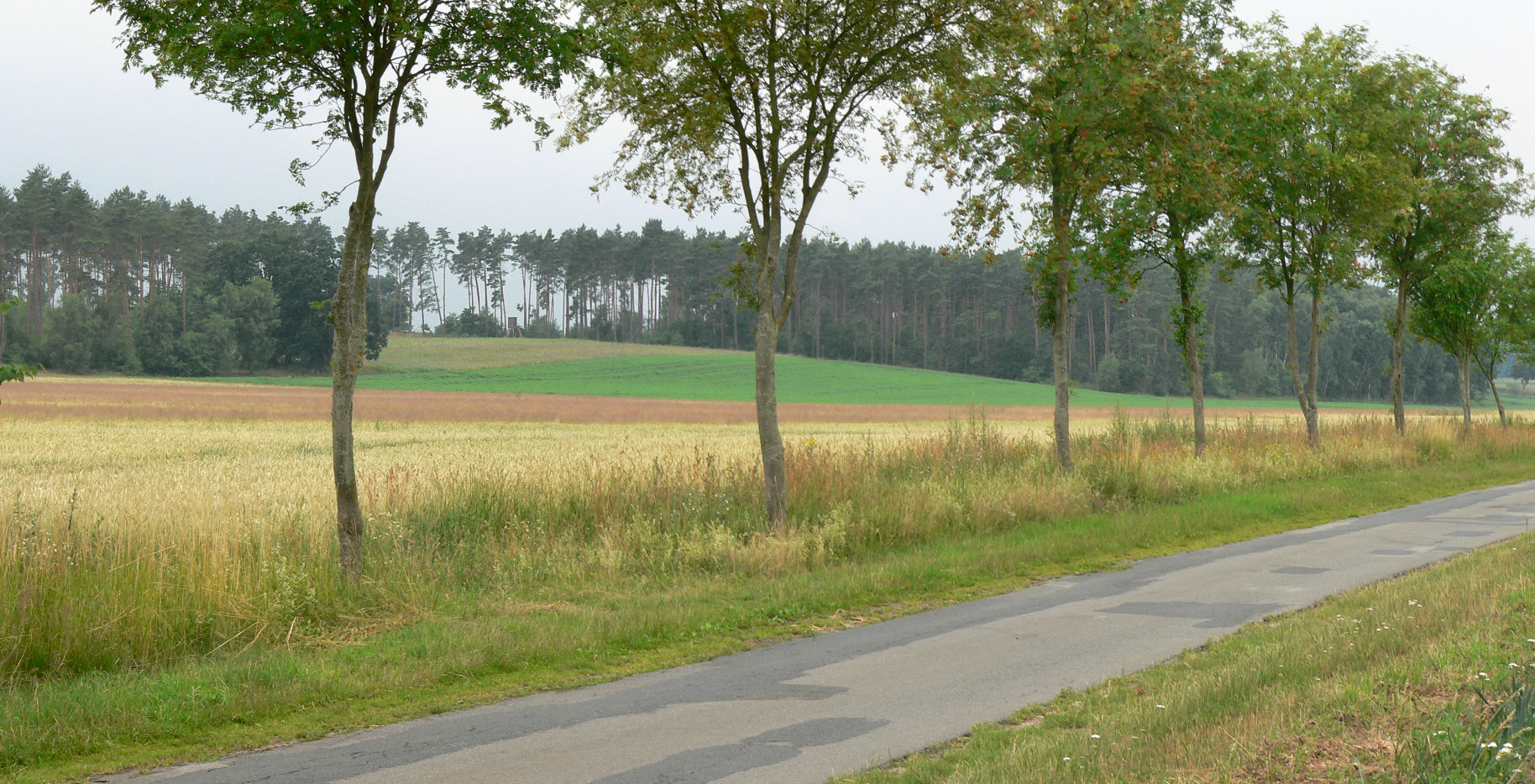 Kiefernwald bei Sareitz auf dem Drawehn